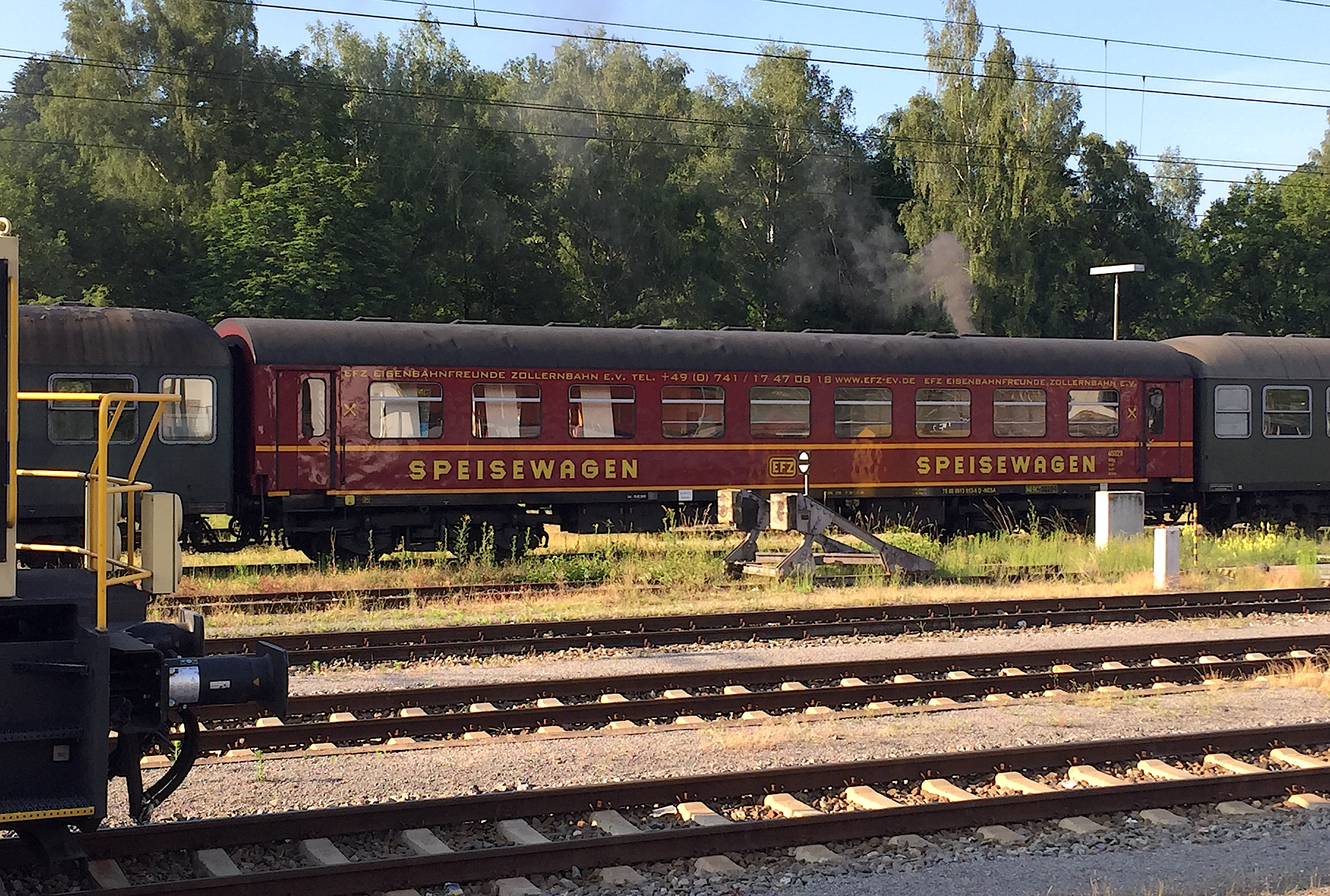 Speisewagen der EFZ, Rottweil (2017)